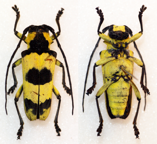 Rondon & Breuning,1971 Sex: ? Data: 06-2013 - Xiang Khuang - Laos Size: ?